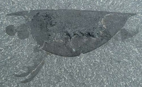 Isoxys acutangulus fossil.